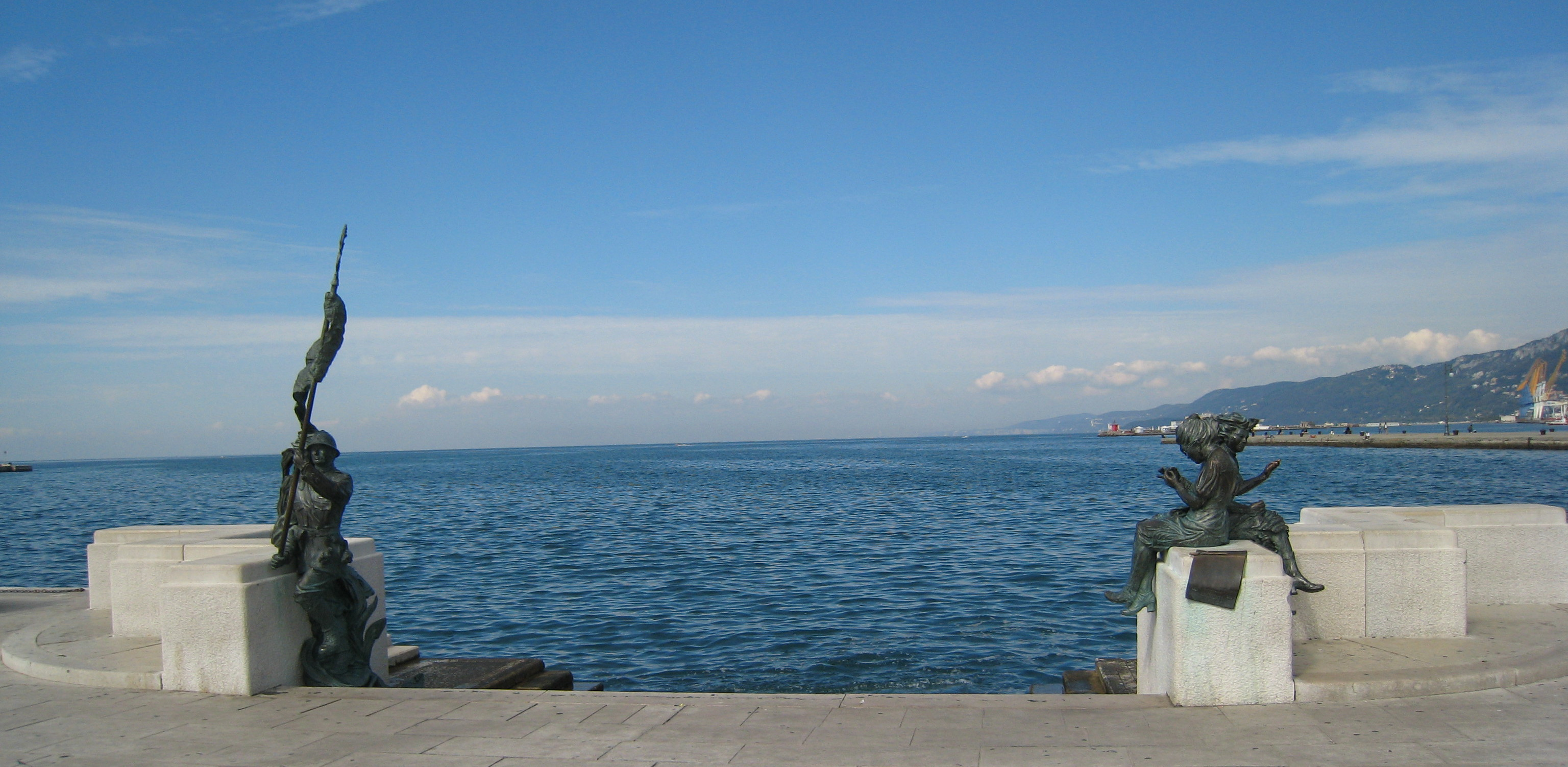 Monument in Piazza Unità - Trieste - Italy